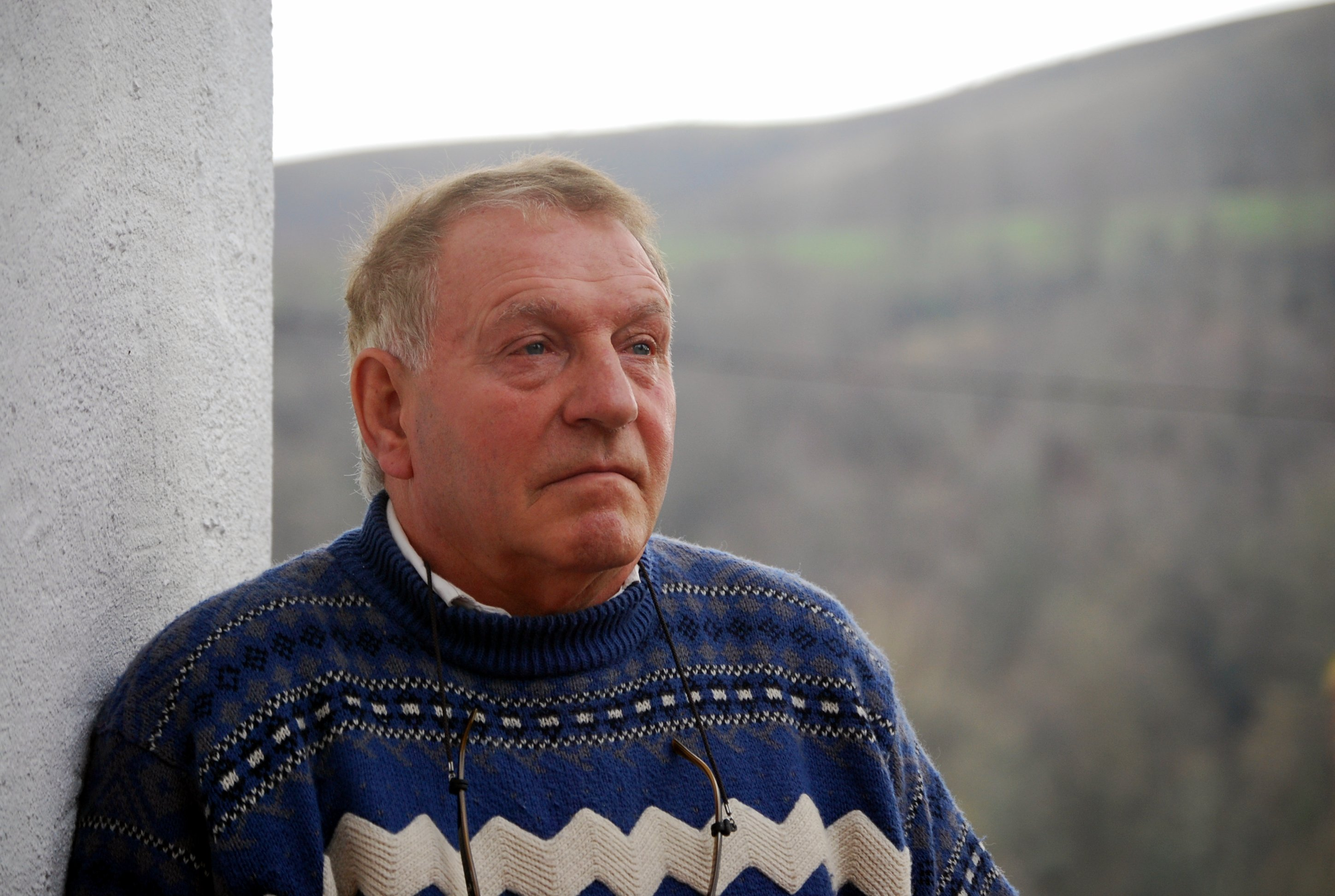 Etxamendi bere etxean